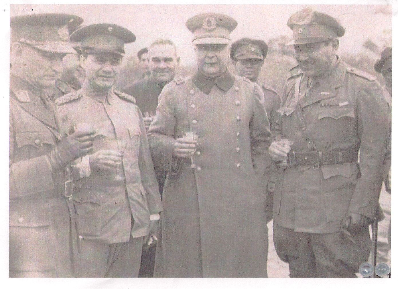 Comision Chilena de Paz, en el Chaco Boreal